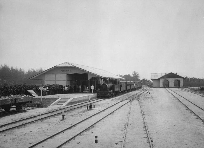 Foto. Een binnengekomen trein met stoomlocomotief op station Perbaoengan op Sumatra